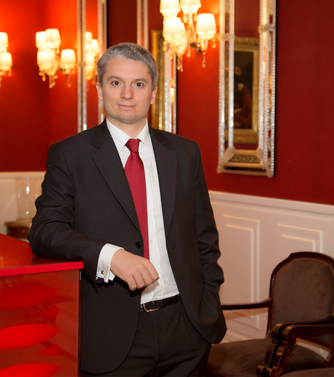 Pierluigi Testa, Presidente del Think Tank Trinita' dei Monti, nell'headquarter